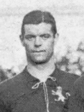 El futbolista Patricio Arabolaza (1893-1935), durante su participación en los Juegos Olímpicos de Amberes 1920 con la selección de España.